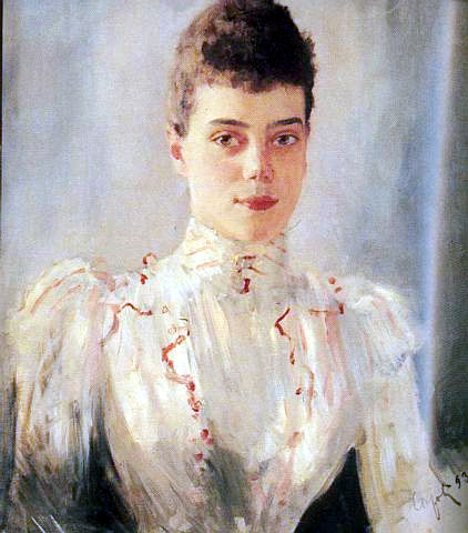 В.Серов. "Портрет Великой княгини Ксении Александровны". 1893 г.